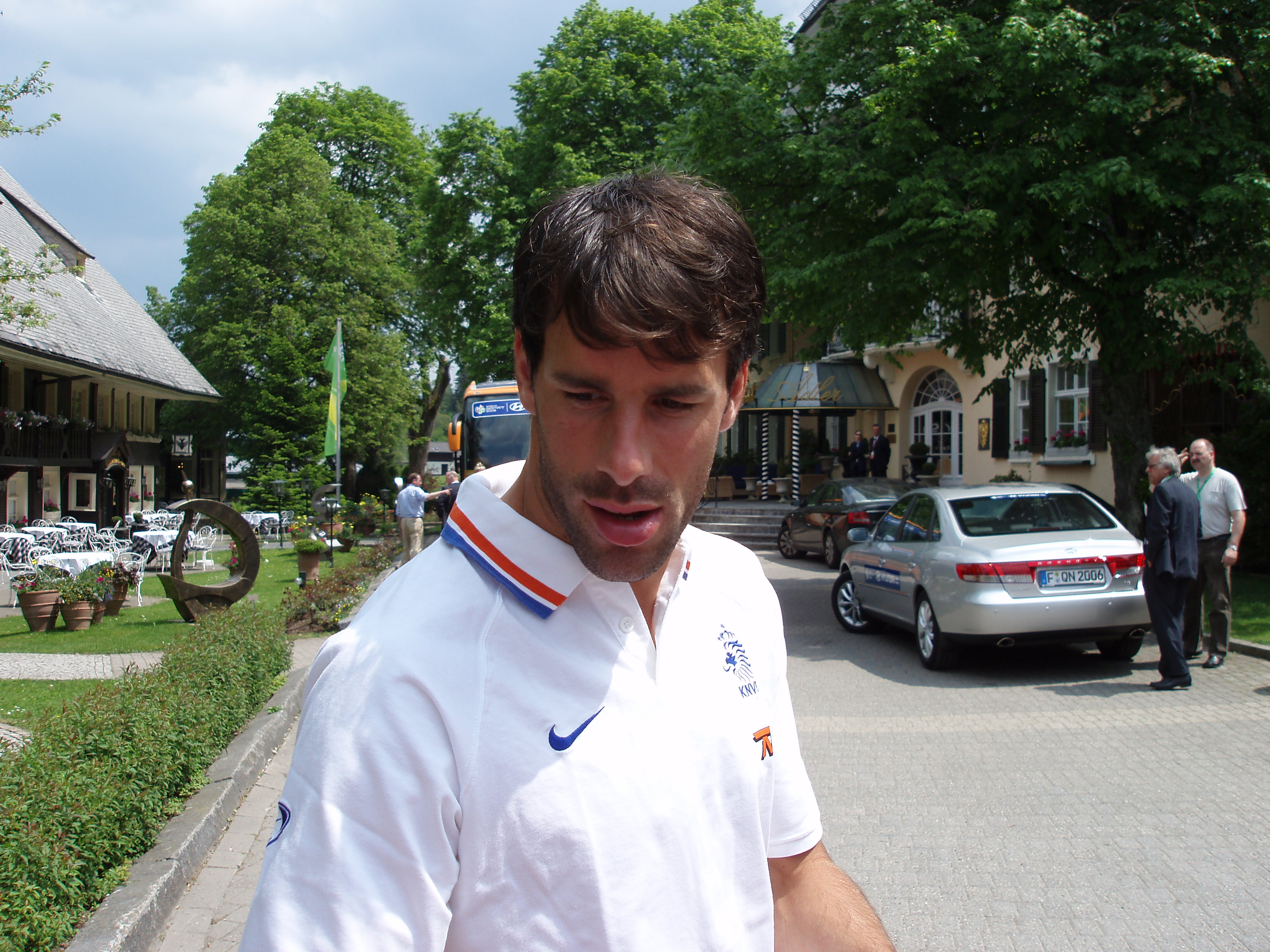 Ruud van Nistelrooy, Spieler der niederländischen Fußballnationalmannschaft